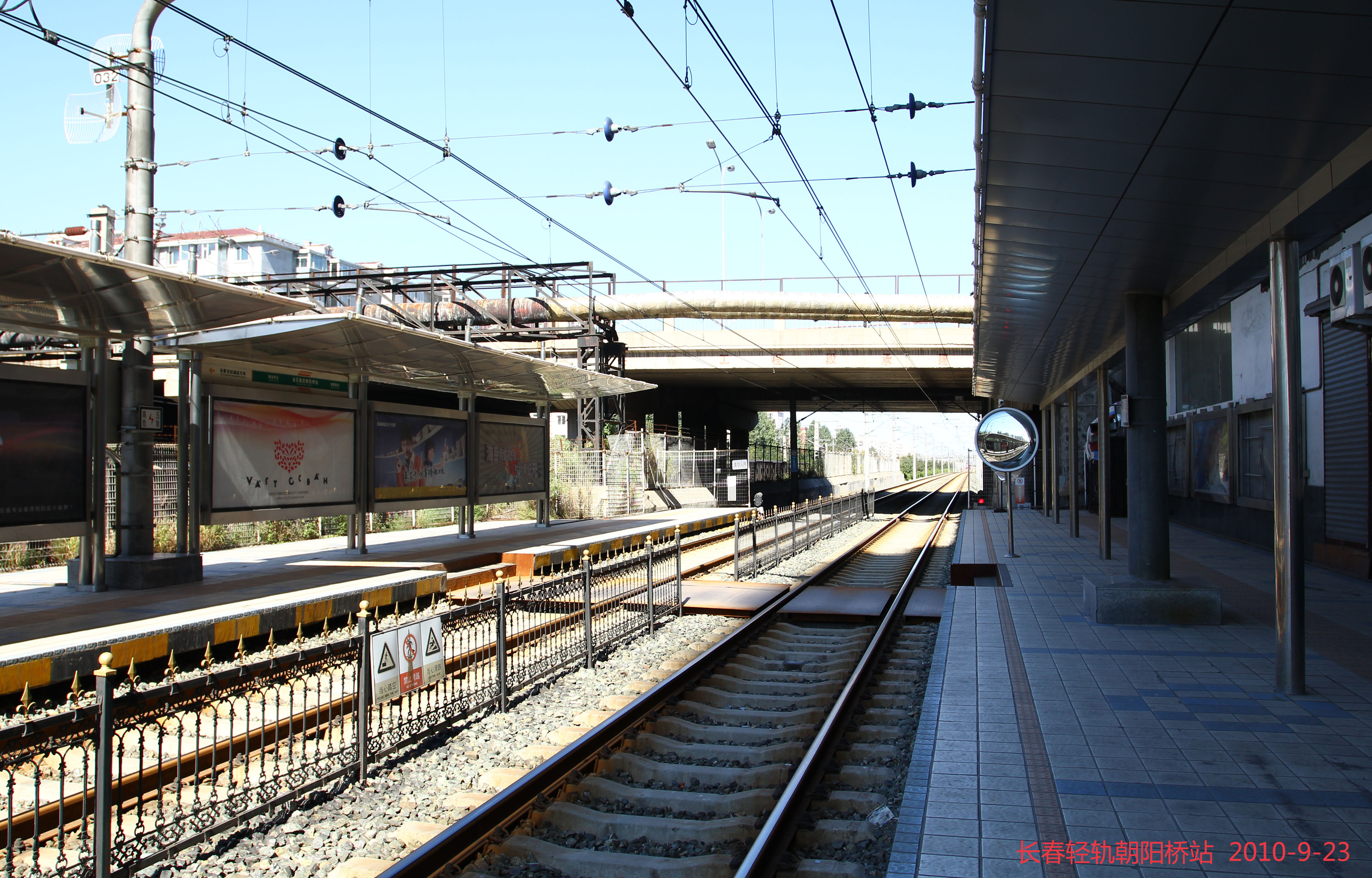 轻轨朝阳桥站 Chao-Yang-Qiao AirTrain Station